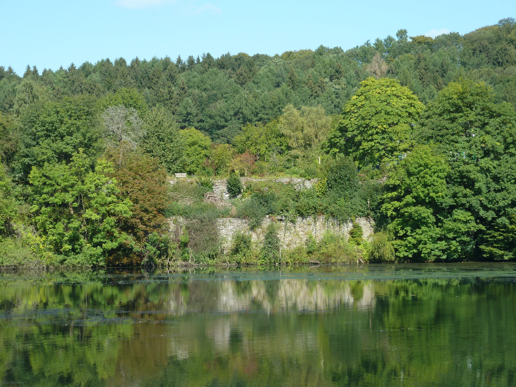 Burgstall Beyenburg, WuppertalThis is a photograph of an architectural monument.